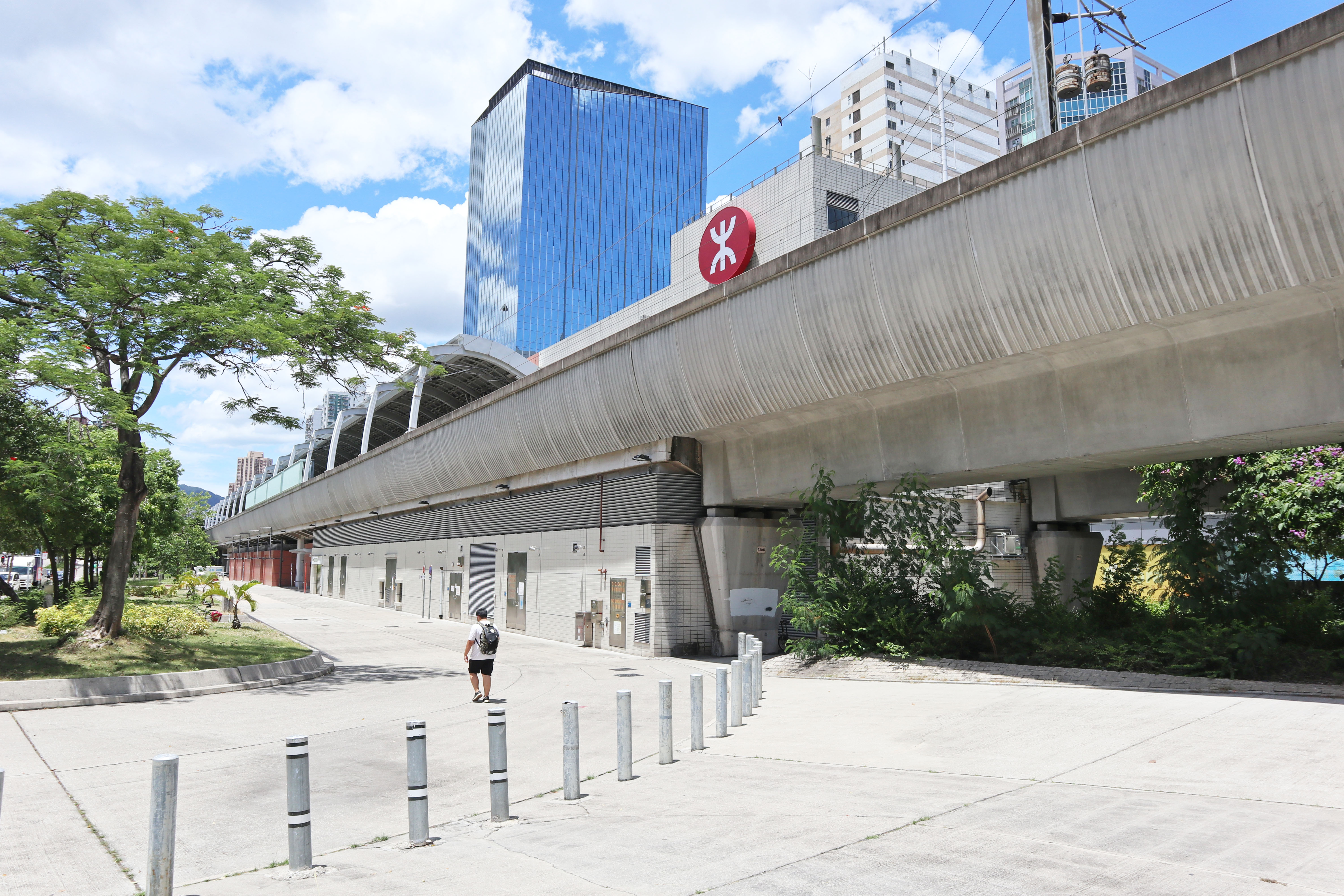 港鐵石門站外觀